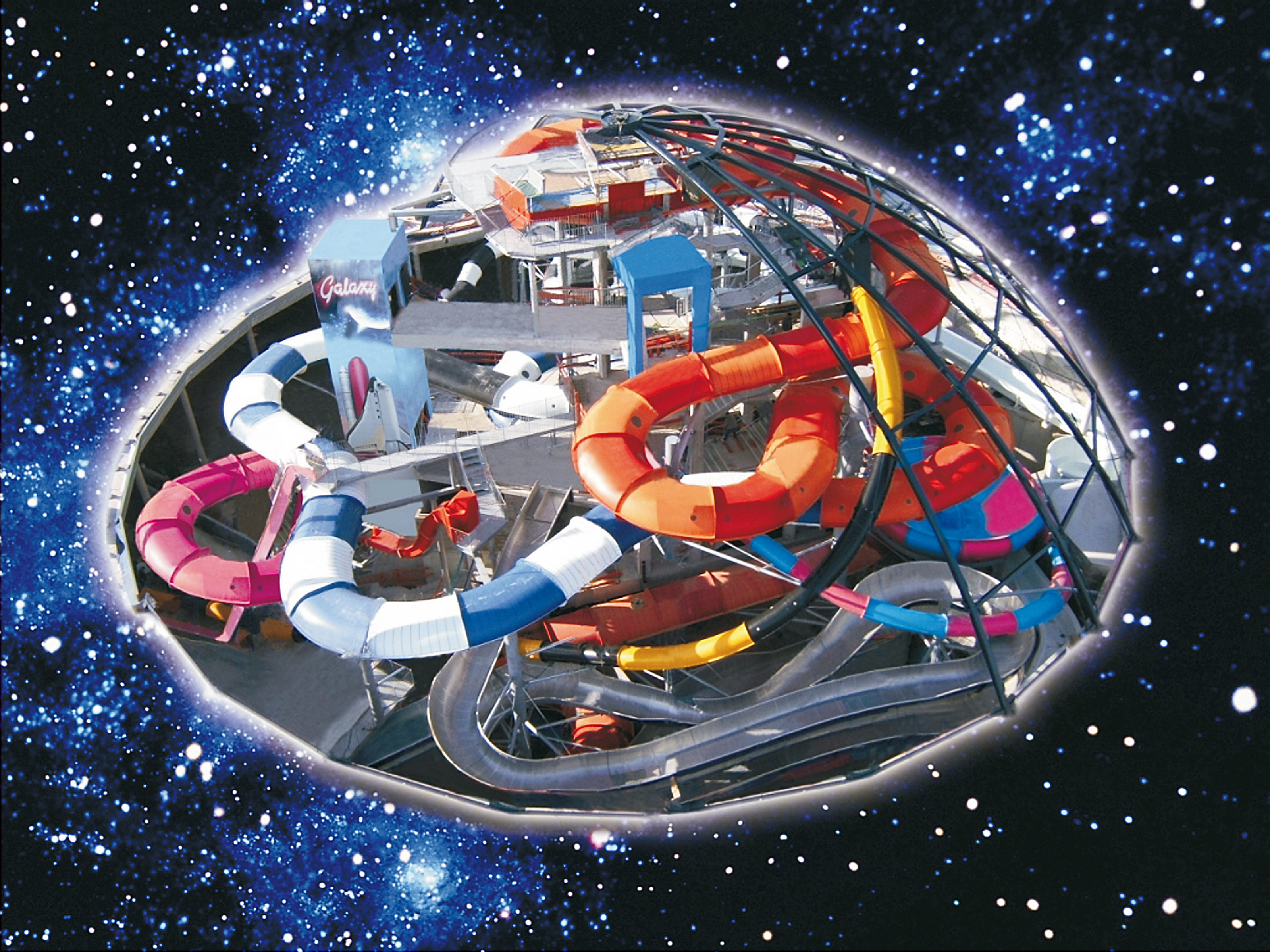 Galaxy Rutschenwelt